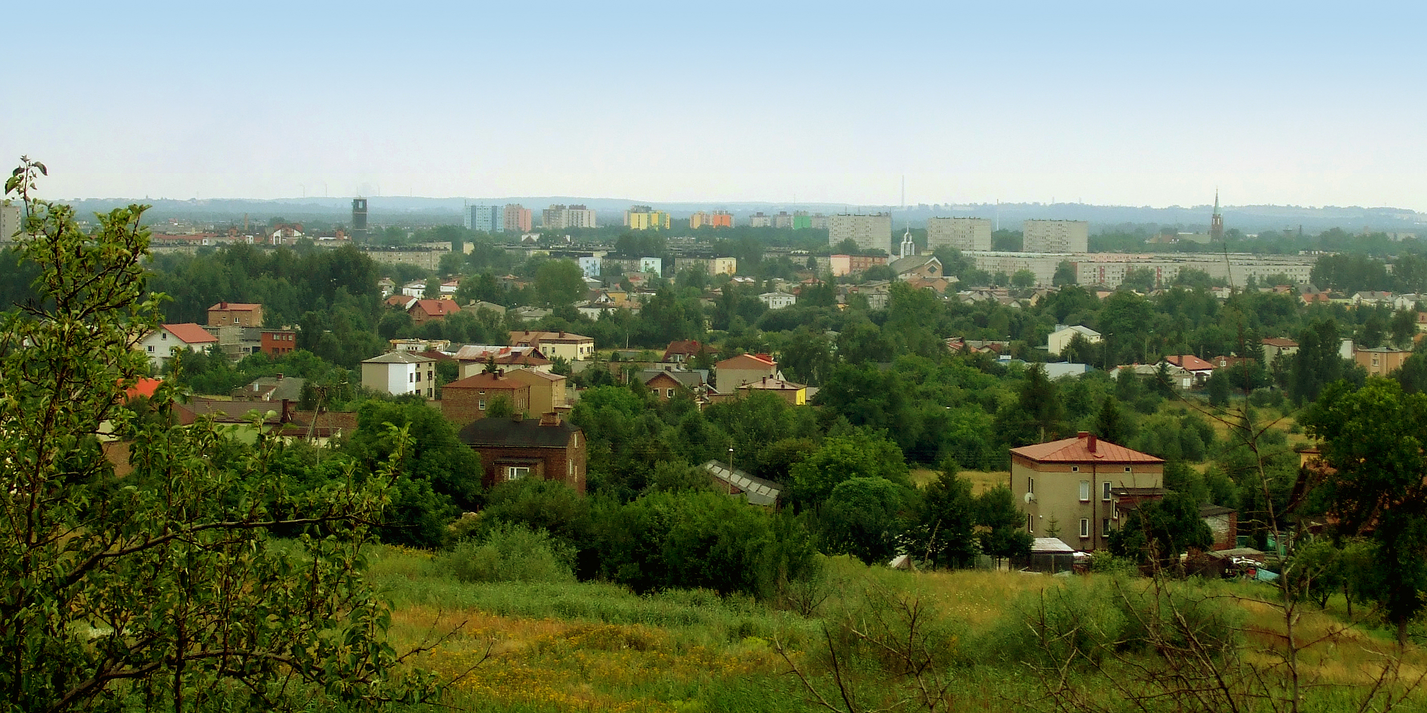 Zawiercie